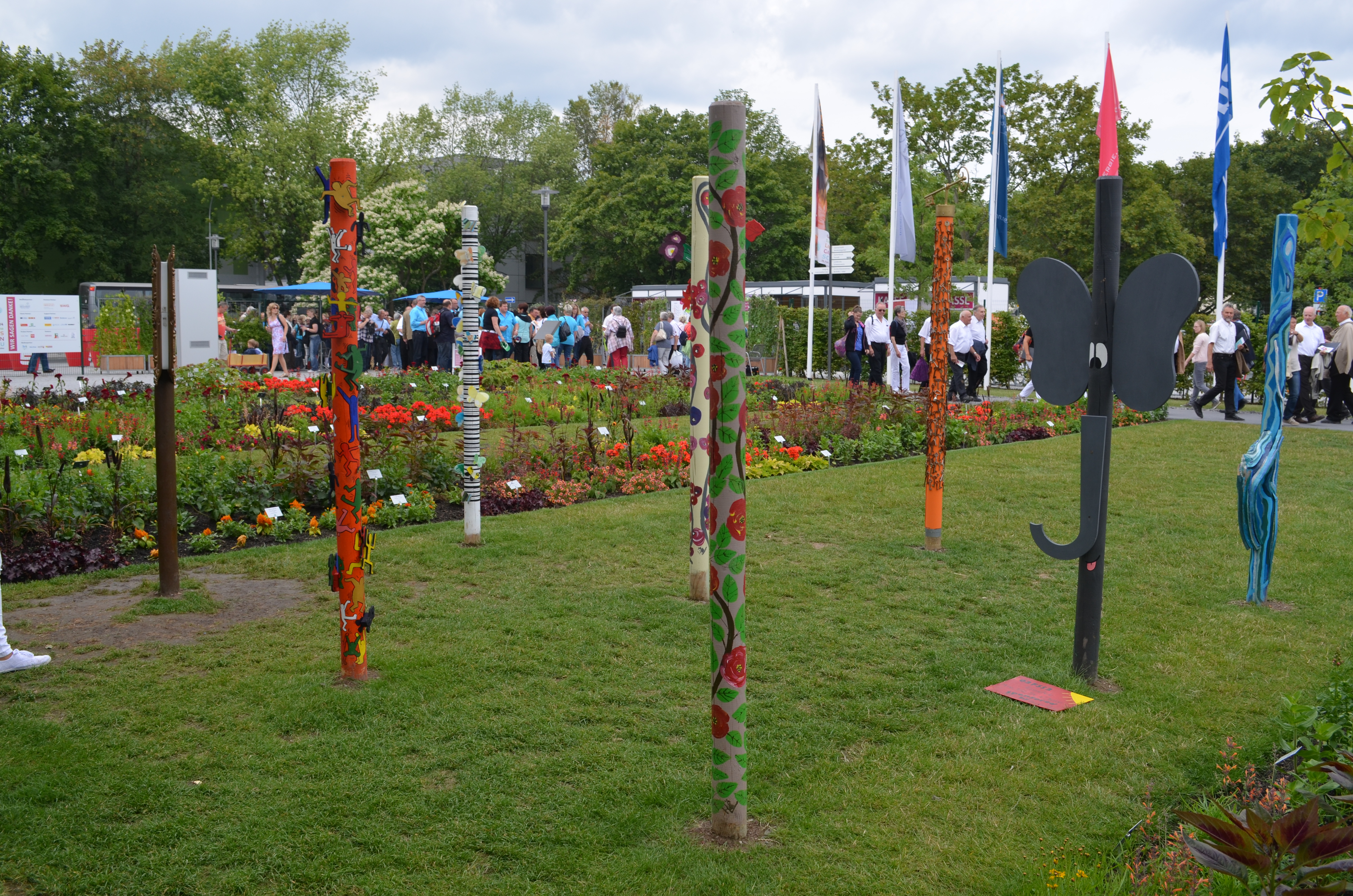 Gießen, Landesgartenschau, Wieseckaue, Kunstleitpfosten